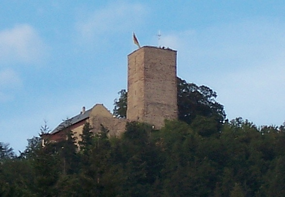 Burgruine Yburg (Schwarzwald)